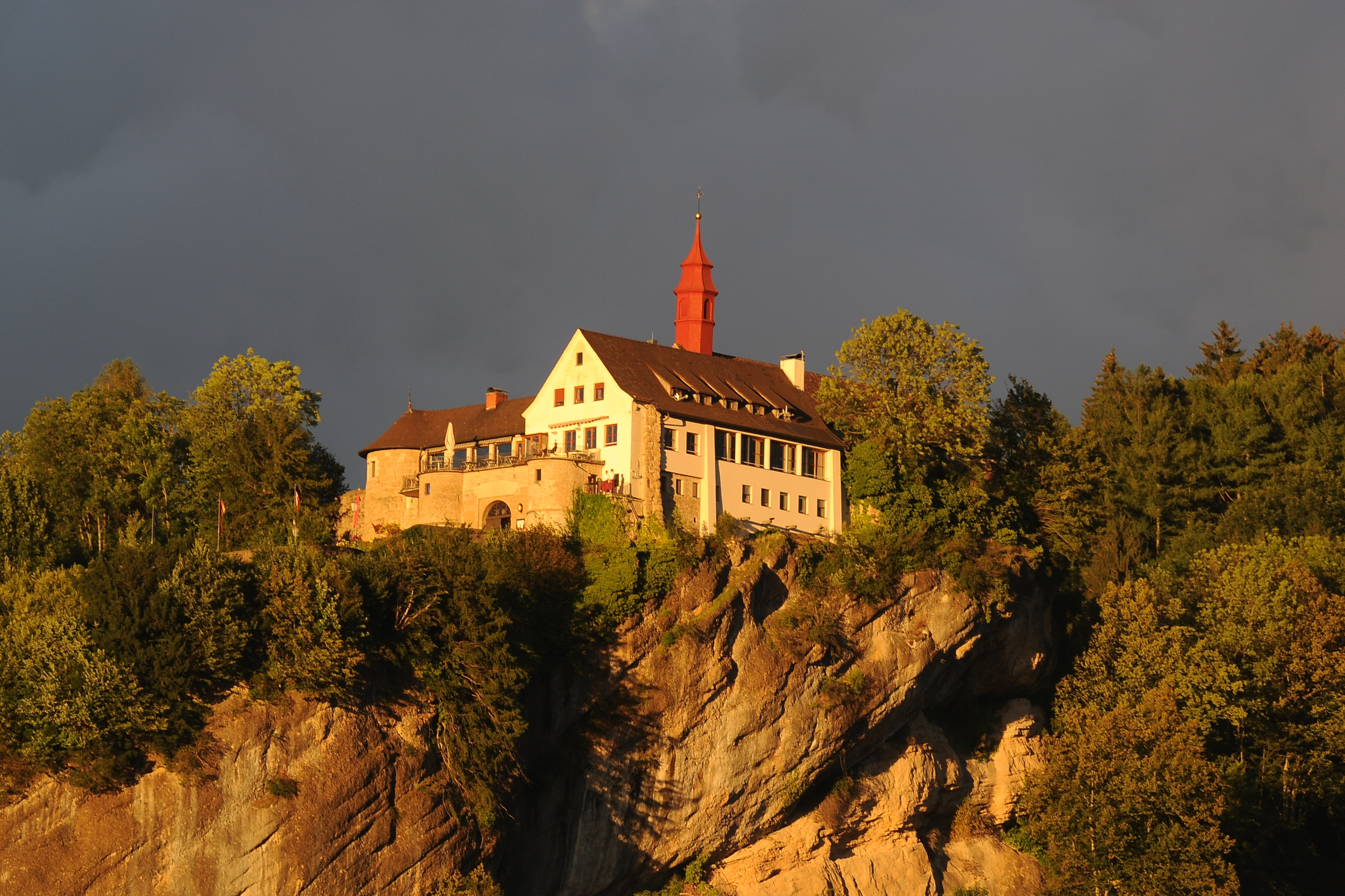 Die Burg Hohenbregenz ist eine hochmittelalterliche Burgruine und liegt auf dem Gebhardsberg bei Bregenz.